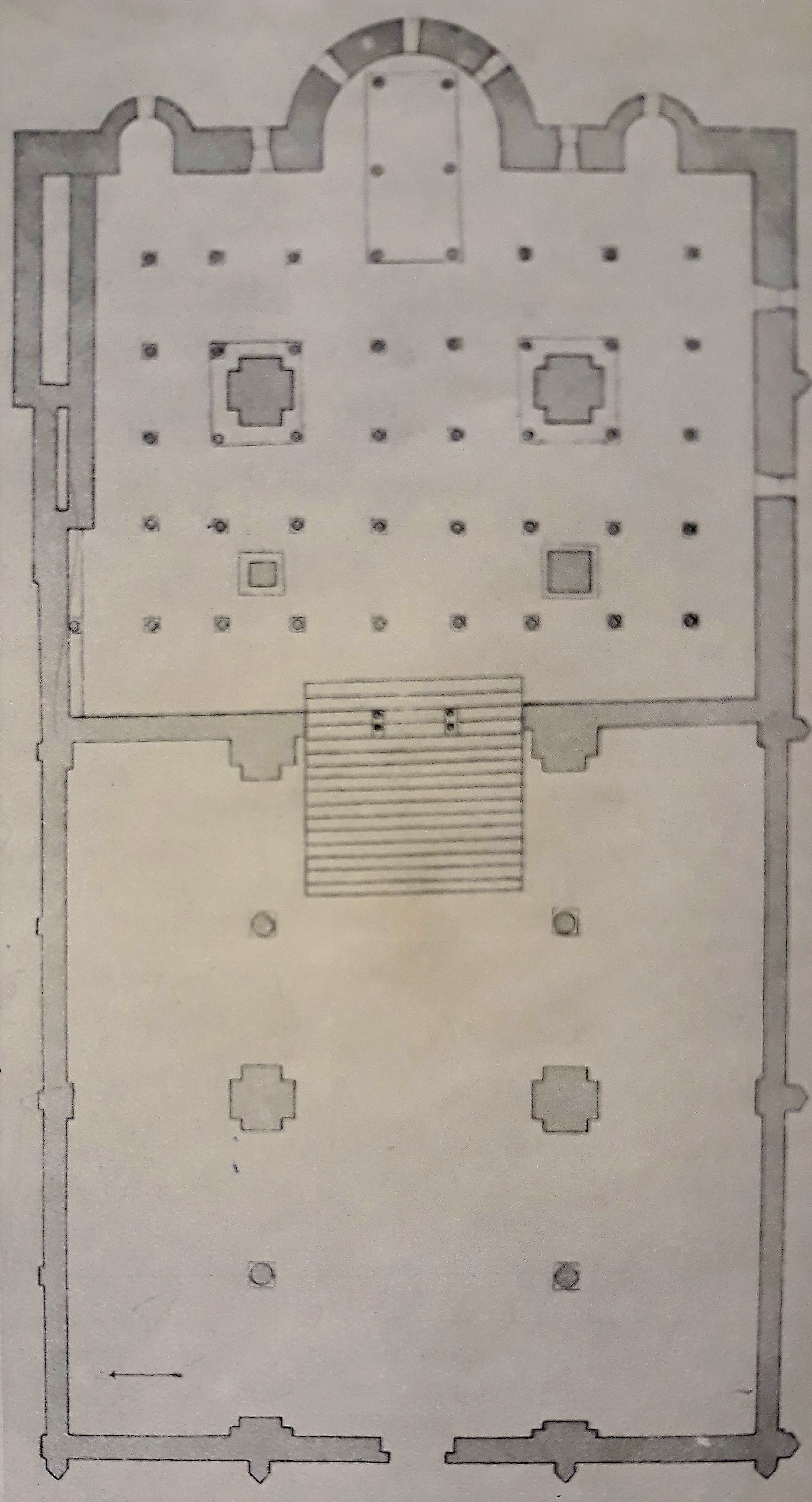 Pianta di come doveva essere la basilica di San Zeno a Verona nel X secolo